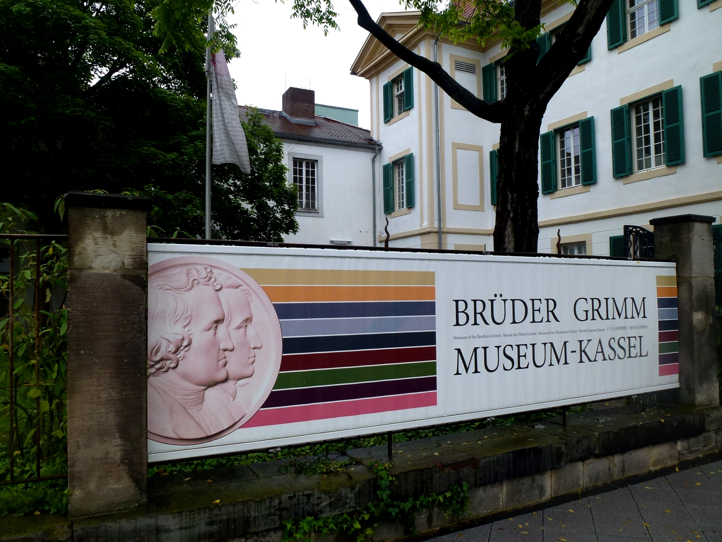 Brüder Grimm Museum Kassel Germany